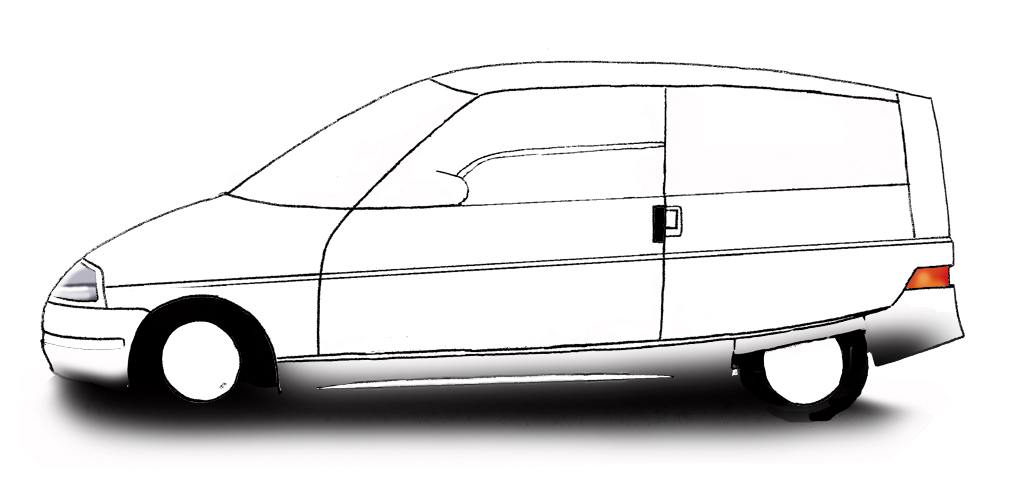 dessin personnel du prototype Renault Vesta 2